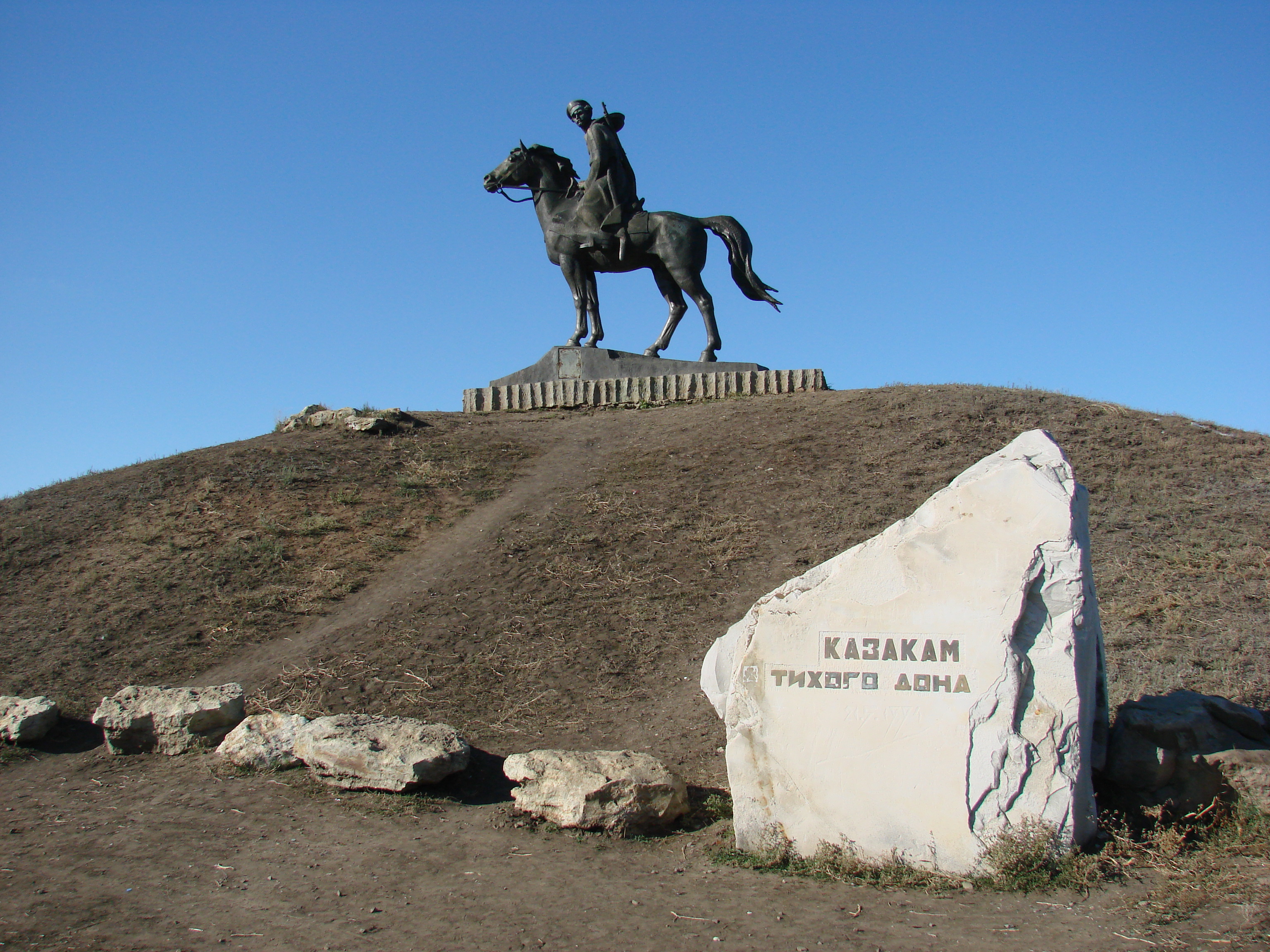 Скульптурная композиция Казакам Тихого Дона: территория по границе СО Чернореченский, в 5 км на запад от въезда в Кружилинский, Кружилинский, Шолоховский район, Ростовская область